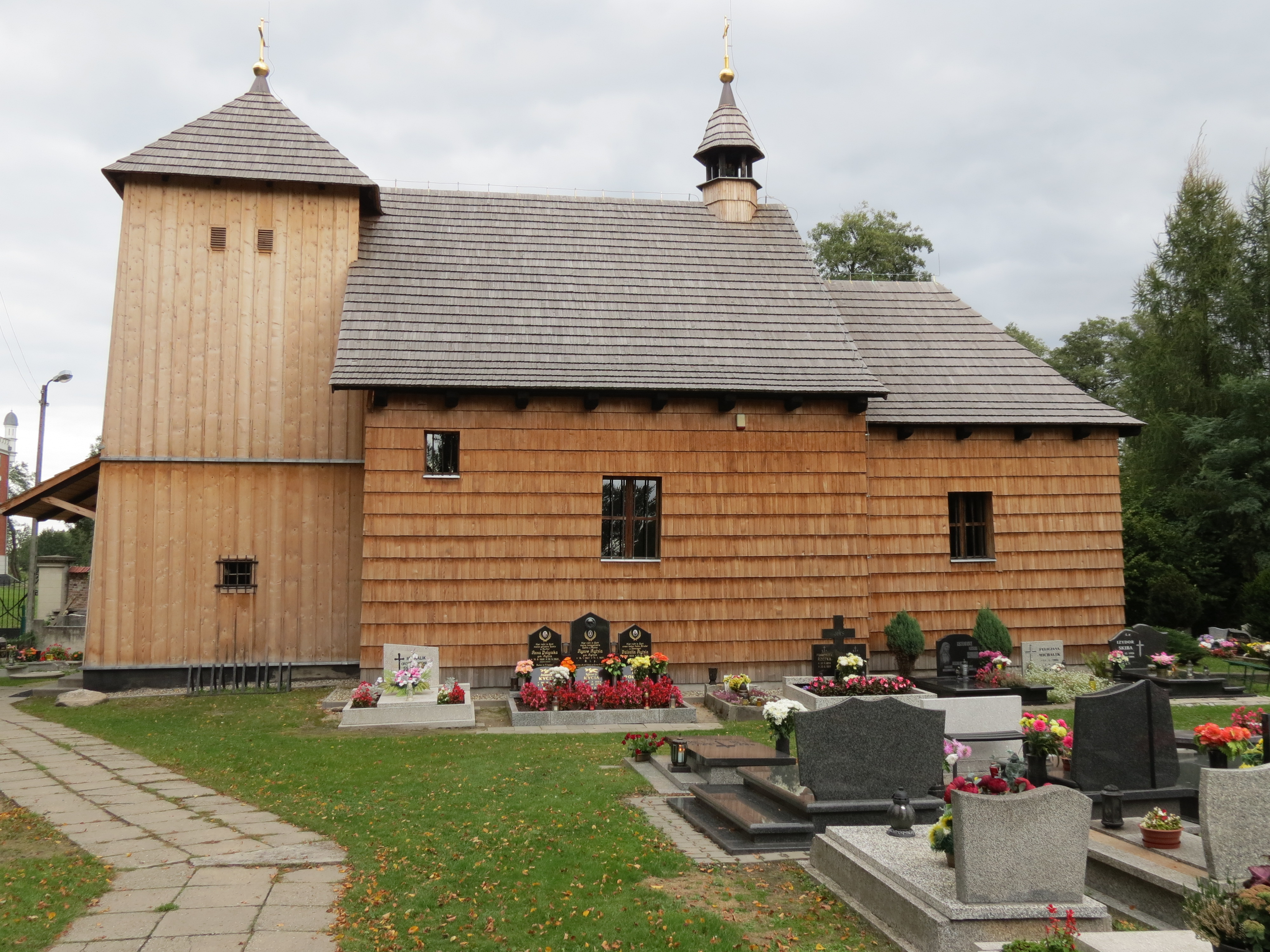 Kościół filialny pw. Narodzenia NMP, drewniany; Szałsza, gmina Zbrosławice, powiat tarnogórski